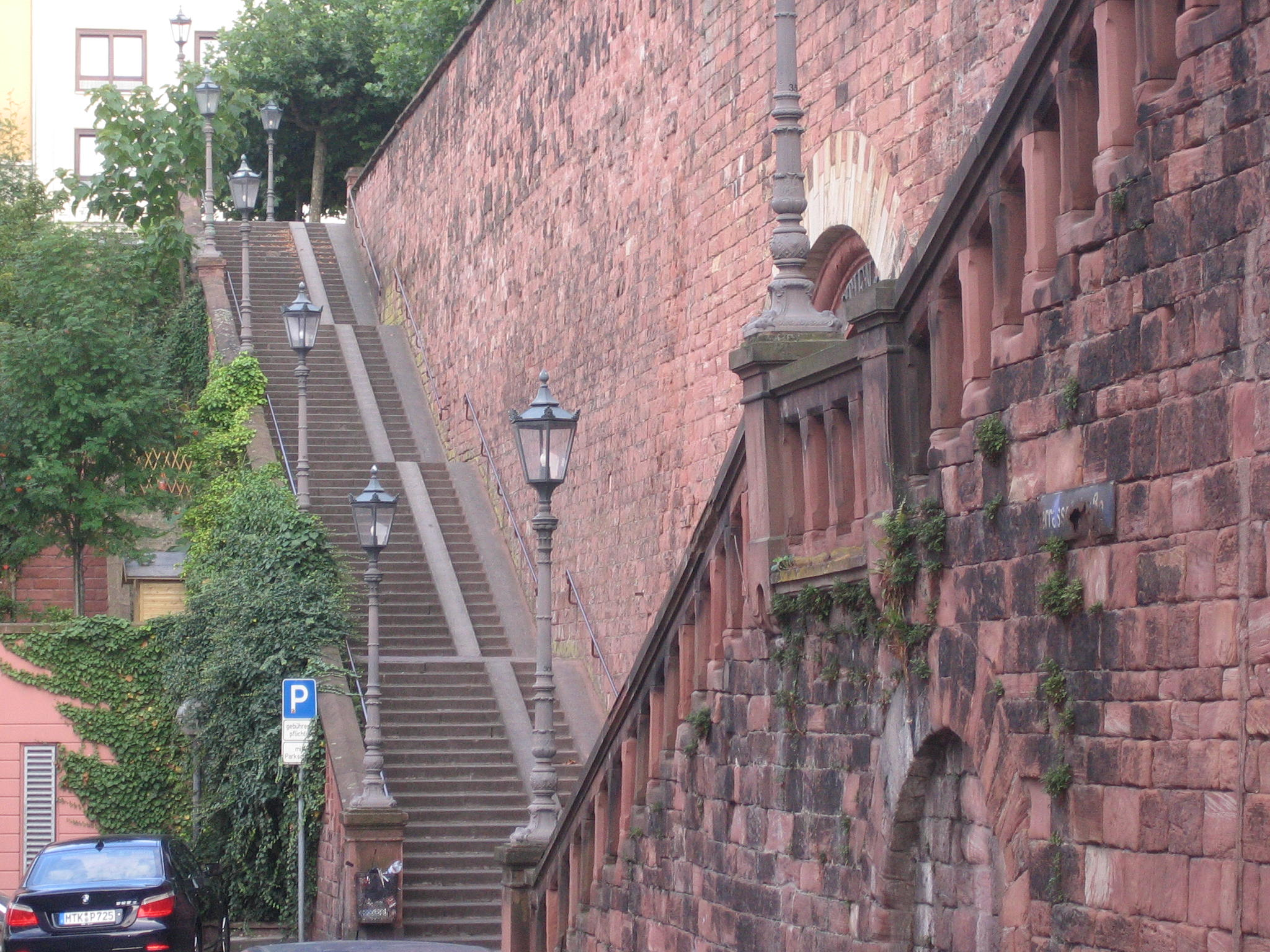 Treppenaufgänge zur Mathildenterrase am Hauptkellertor der Mainzer Aktien Bierbrauerei